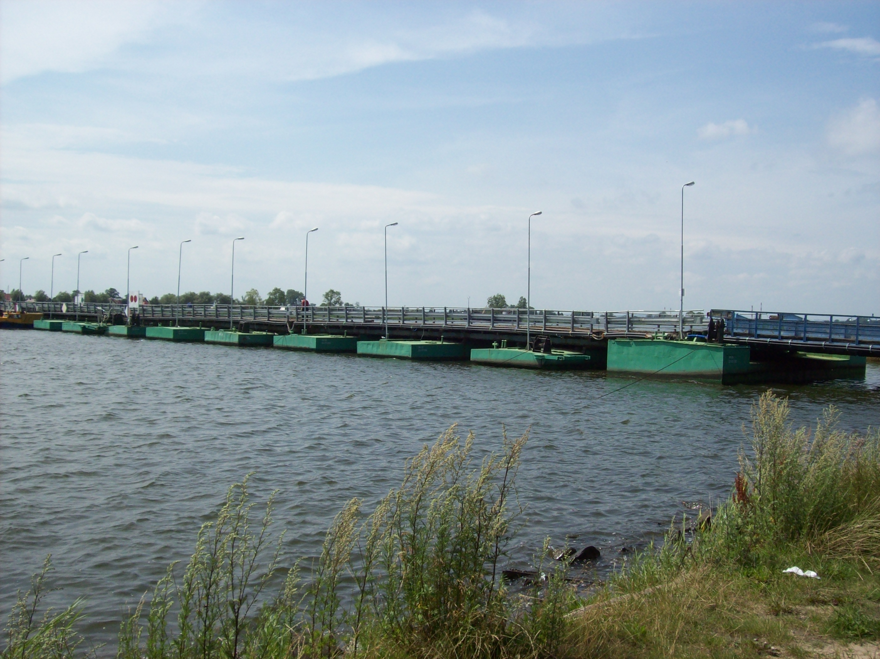 Most Sobieszewski - pontoon bridge in Poland